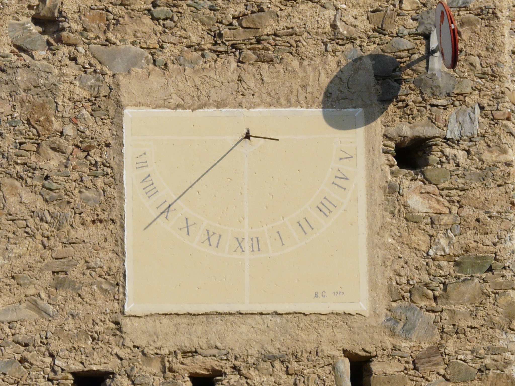 Meridiana presso Massimino, Liguria, Italia